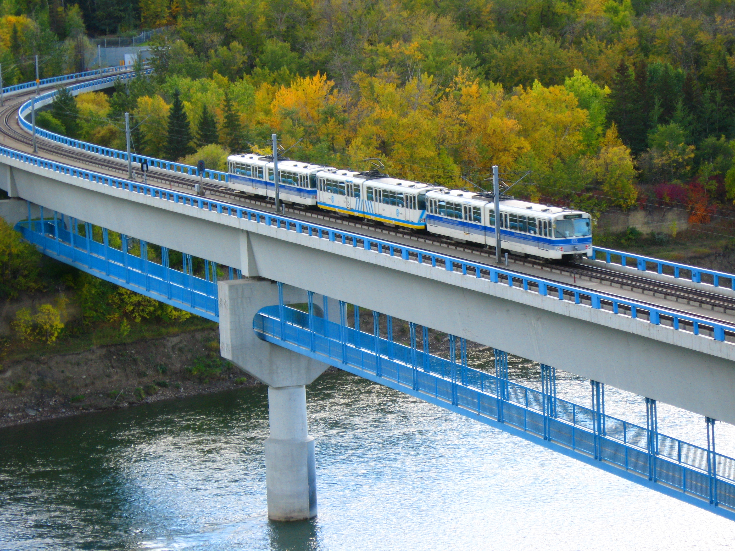 LRT